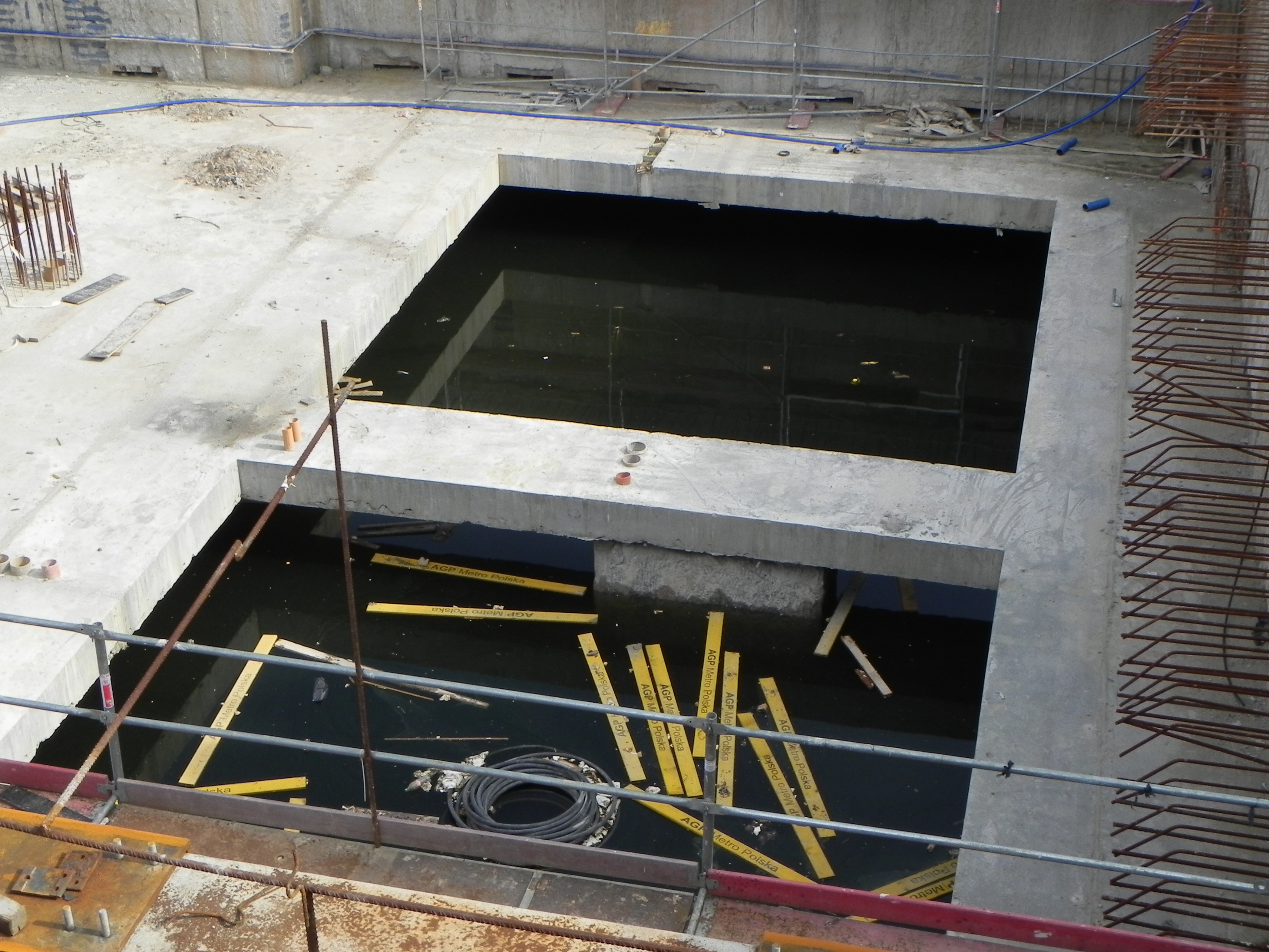 Zalana budowa stacji metra C13 Centrum Nauki Kopernik